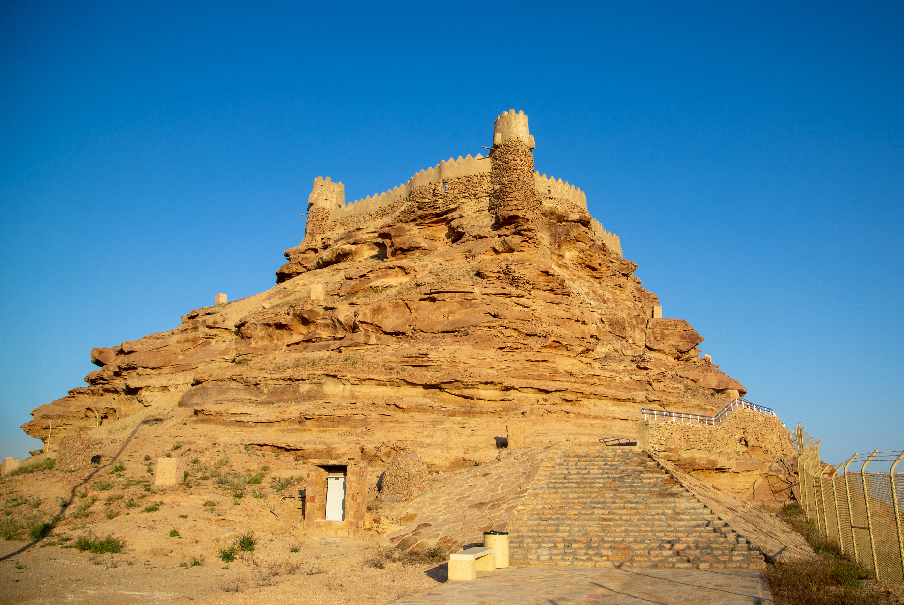 قلعة زعبل